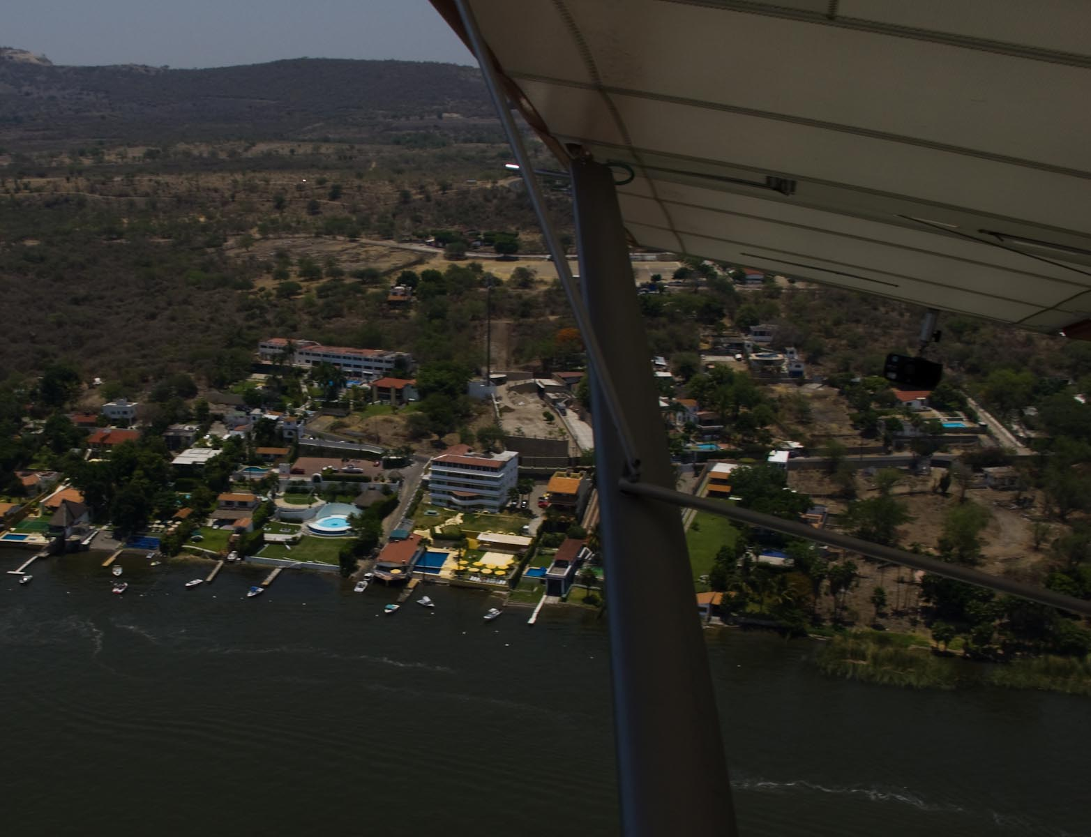 Vista aérea del Lago de Tequesquitengo